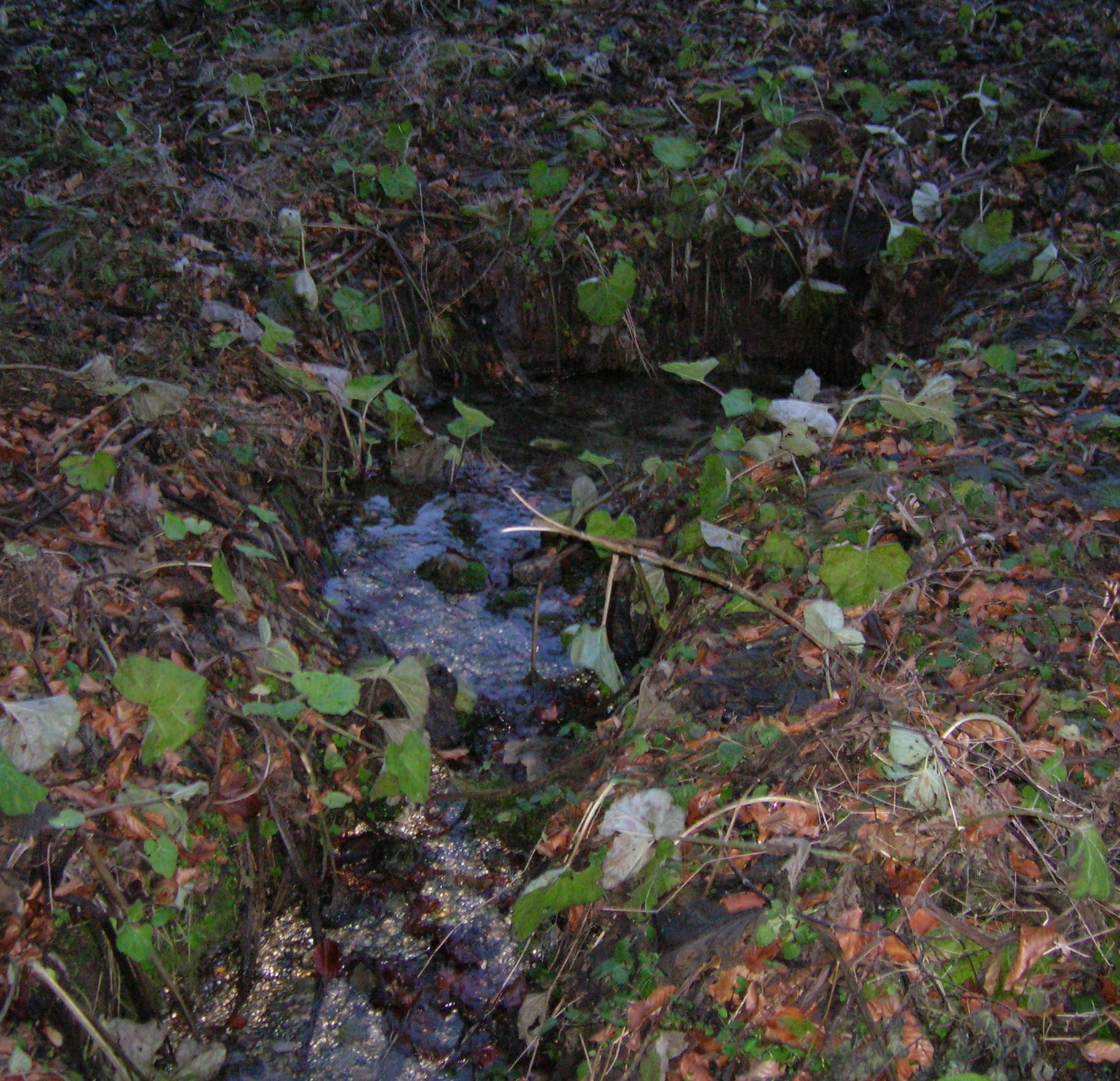 Źródło Dubie